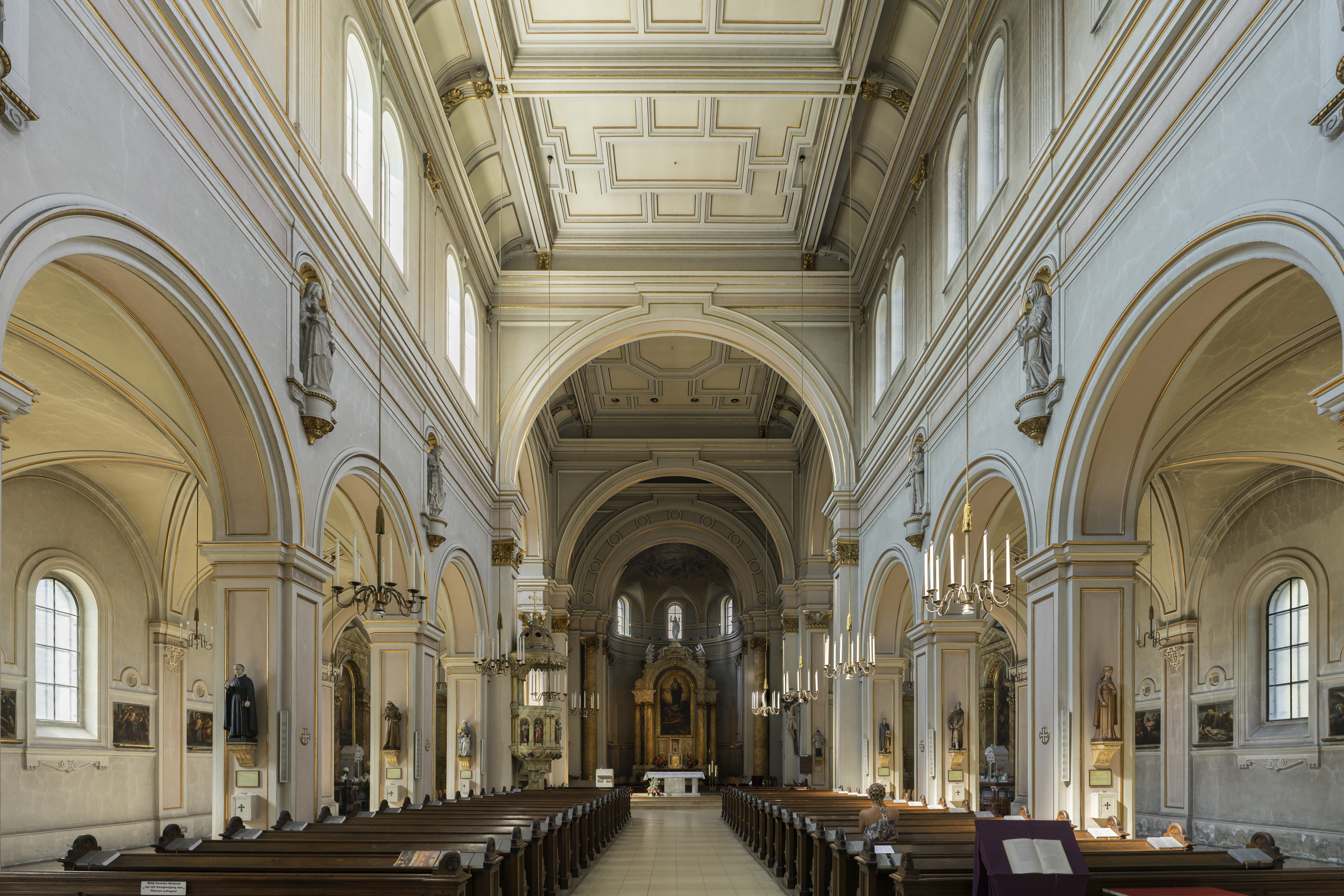 Kath. Pfarrkirche hl. Johannes Evangelist